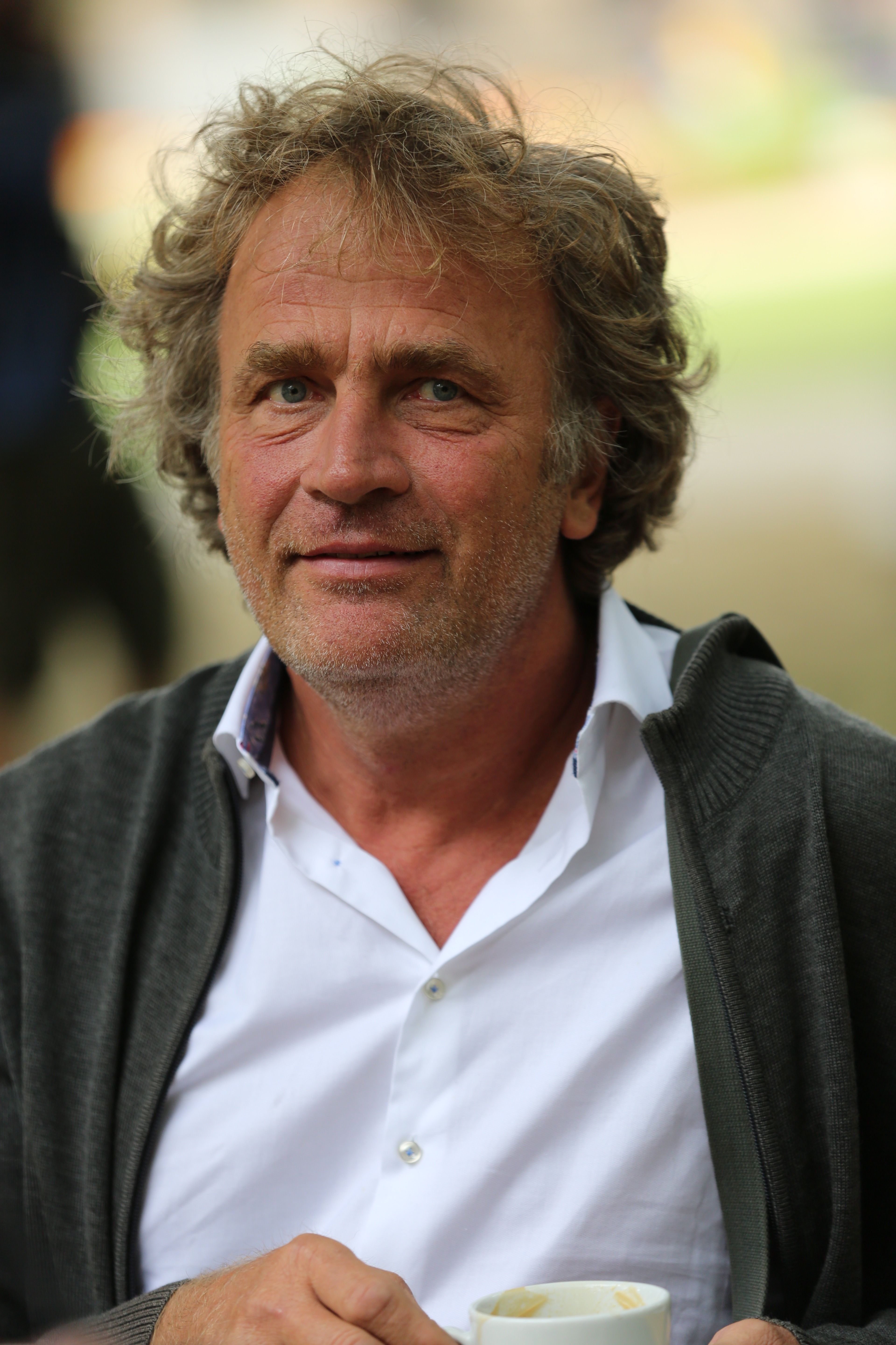 Der Schriftsteller Alex Capus bei der Vorstellung seines Romans "Königskinder" auf dem Erlanger Poetenfest 2018